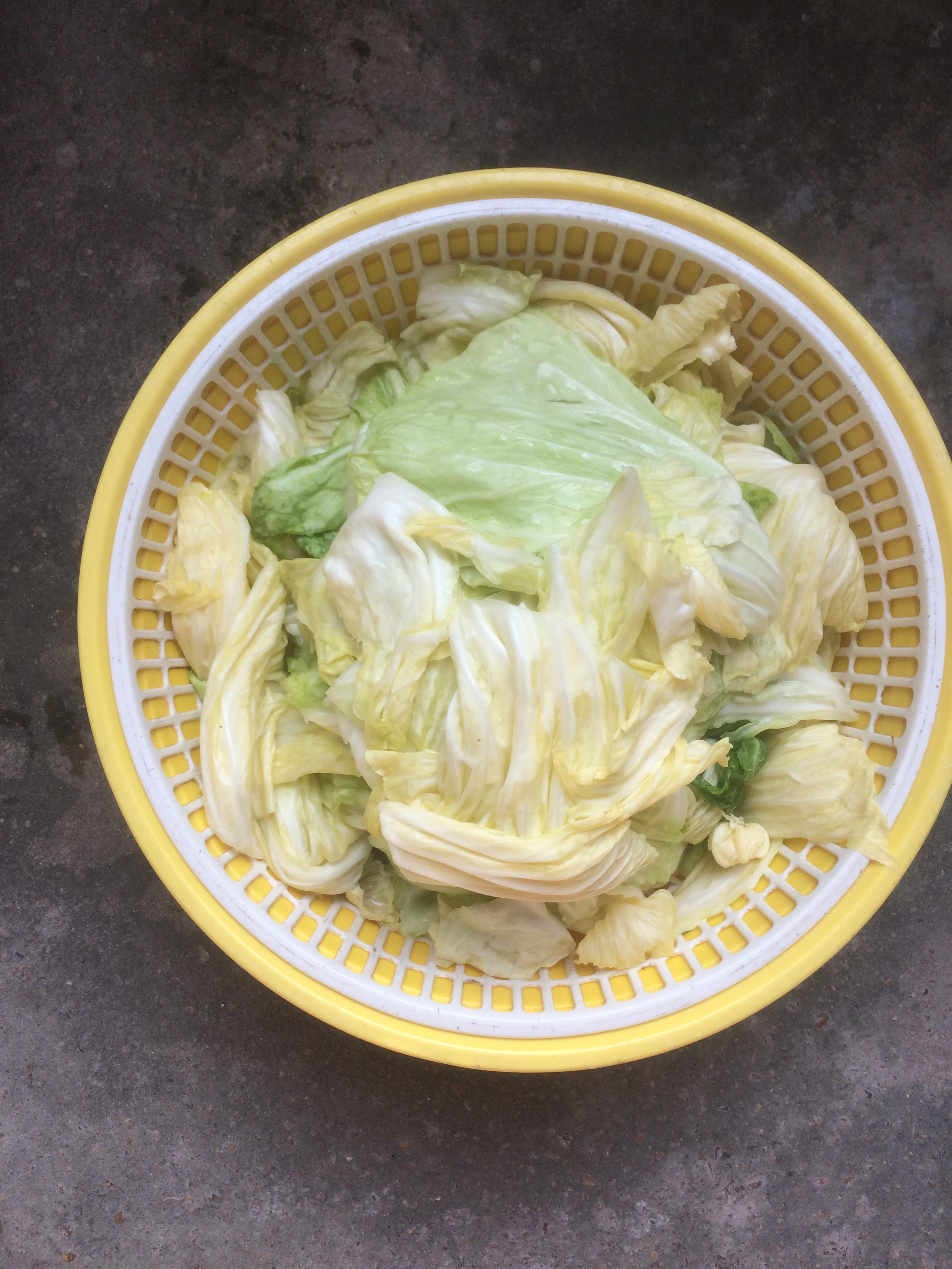 양배추 김치를 만들기 전에 소금에 절인 양배추